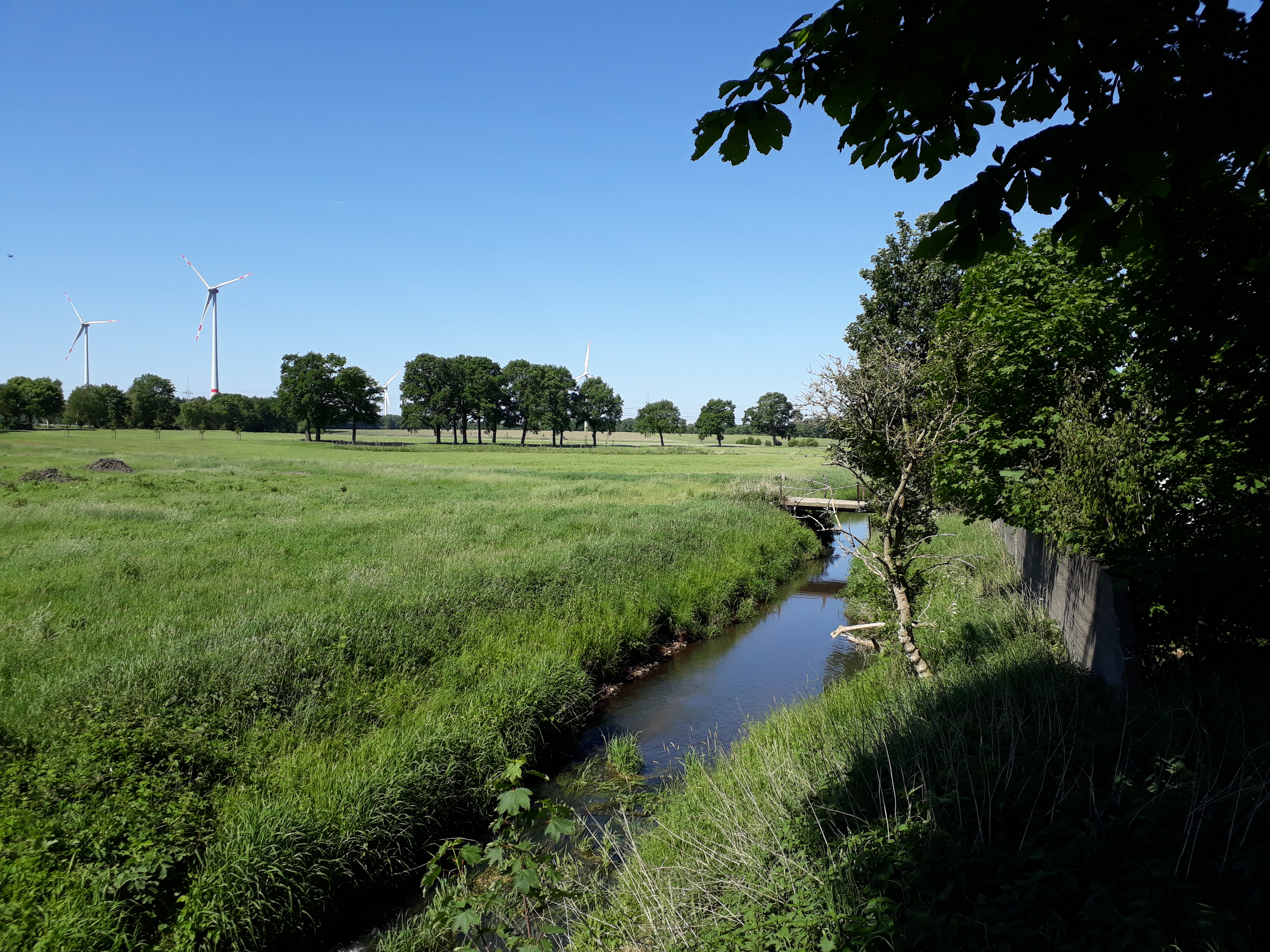 Aue in Oersdorf, Ahlerstedt.